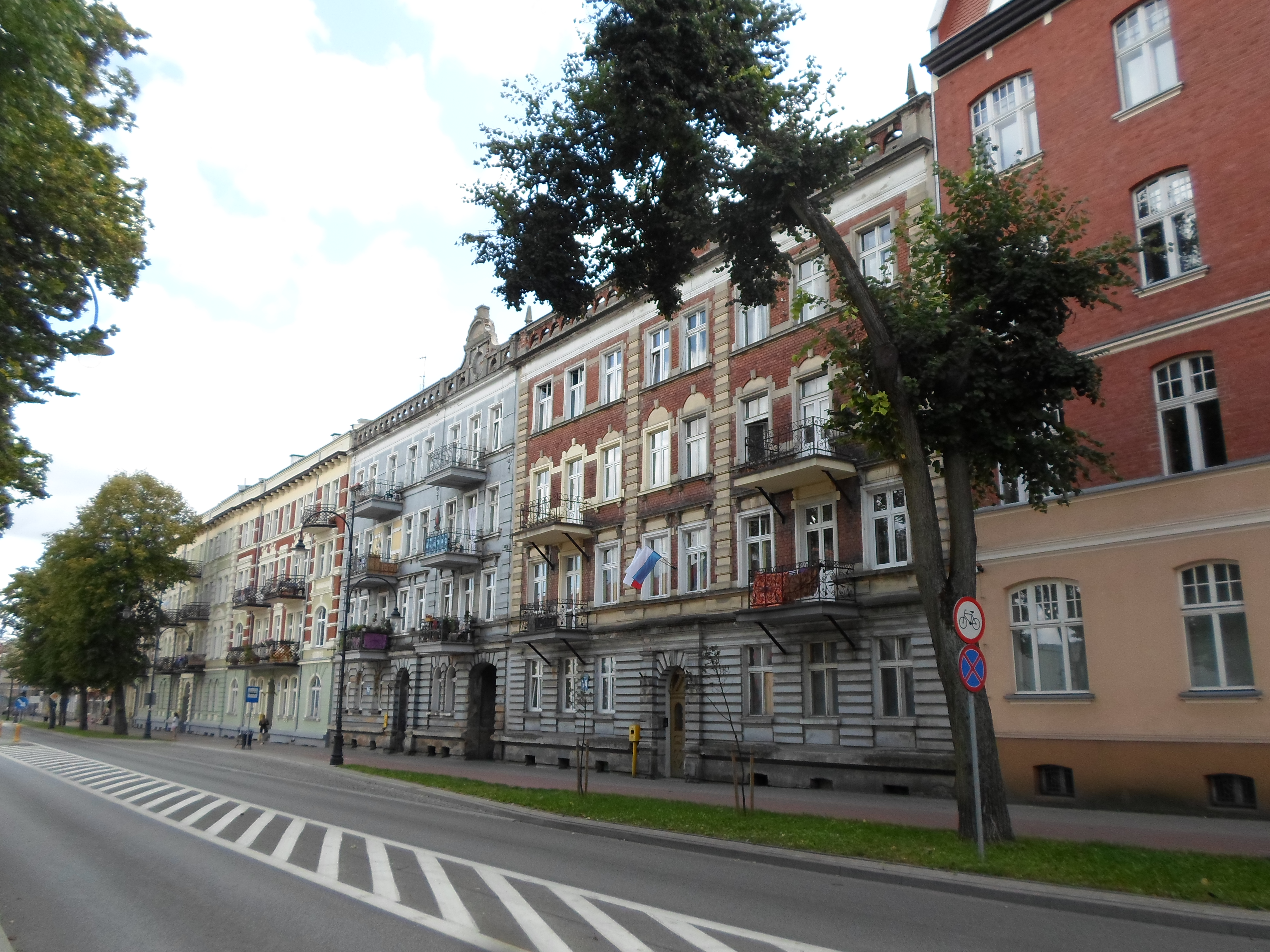 Kamienice przy ulicy A. Mickiewicza 14, 16 i 18 w Ełku widziane w kierunku wschodnim